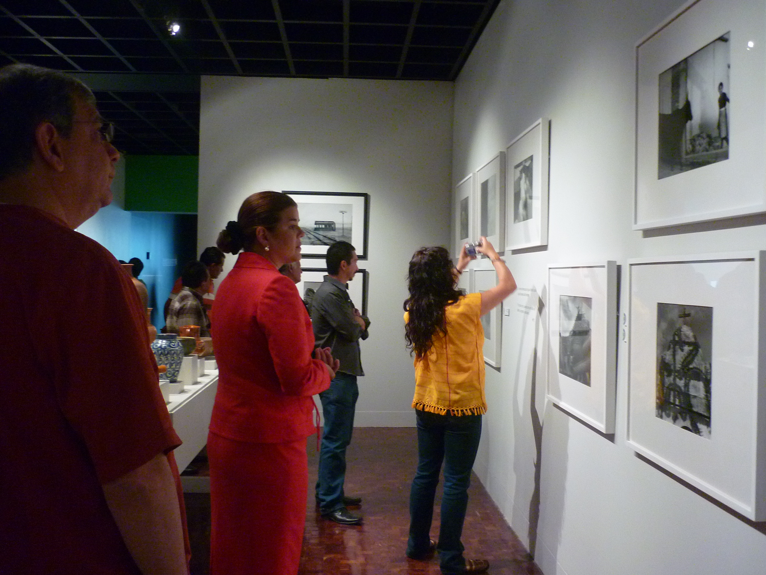 Asistentes a la inauguración de la exposición de Mariana Yampolsky en el Museo de Arte Popular